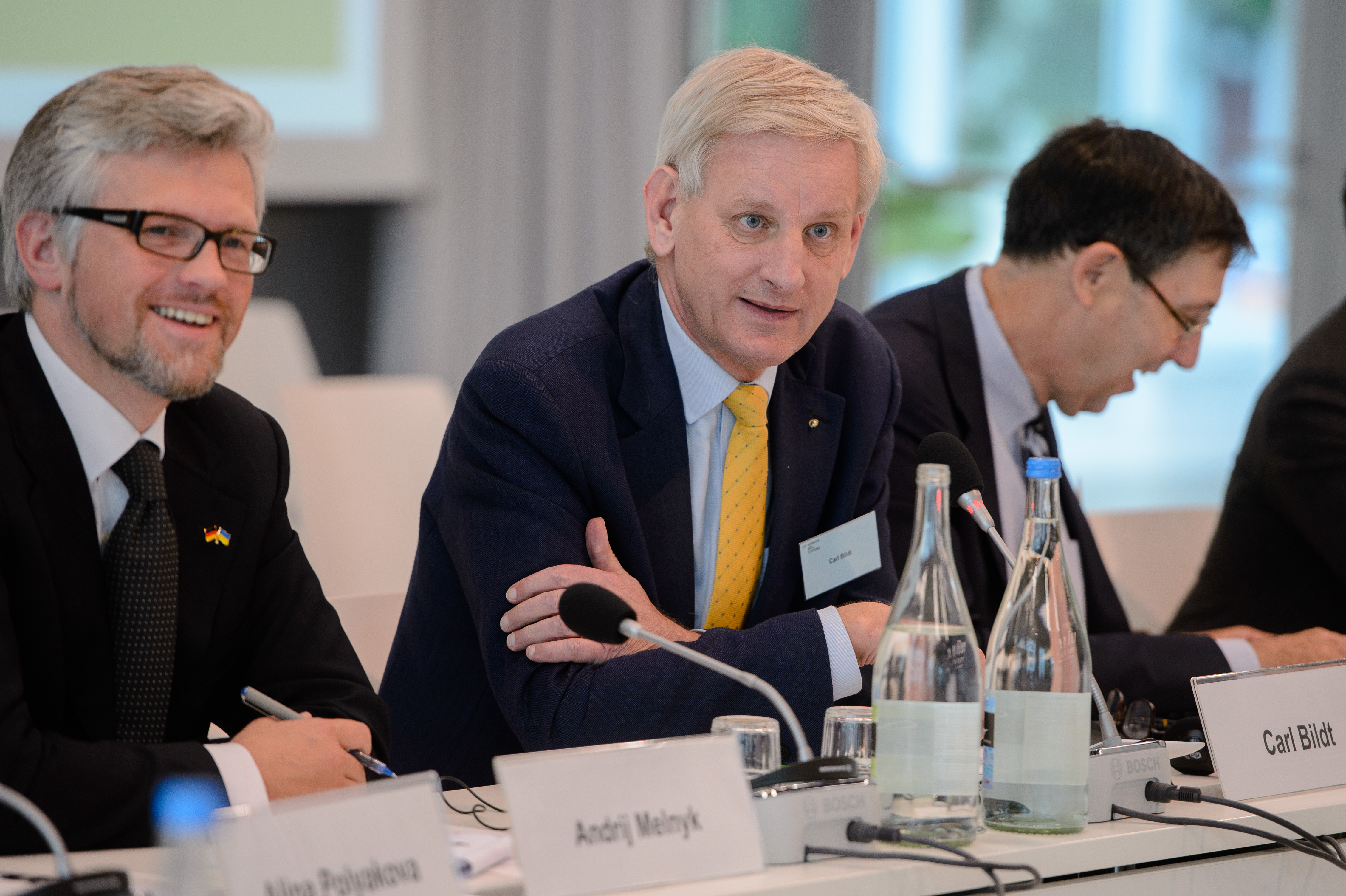 Andrij Melnyk (Botschafter der Ukraine in Deutschland), Carl Bildt (Former Prime Minister of Sweden) Foto: Stephan Röhl